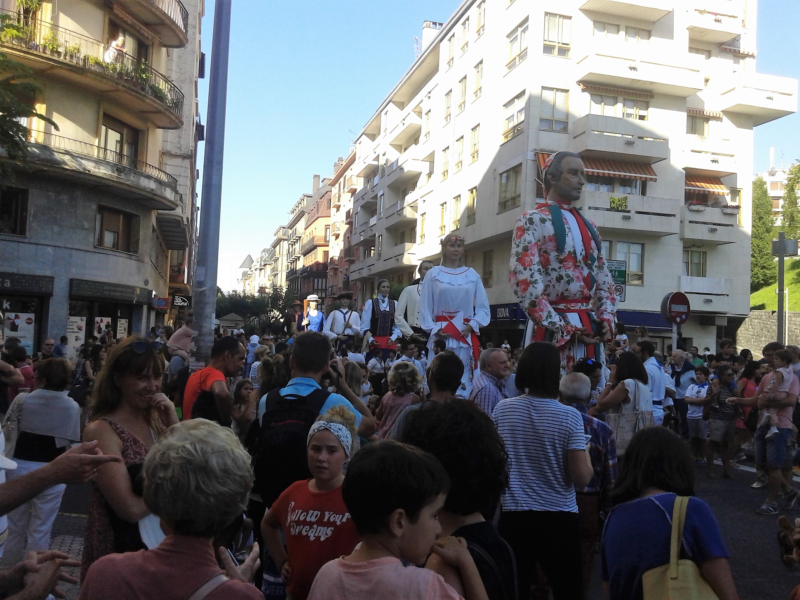 Donostiako erraldoien konpartsa Antigua auzoan, 2017ko abuztuan.